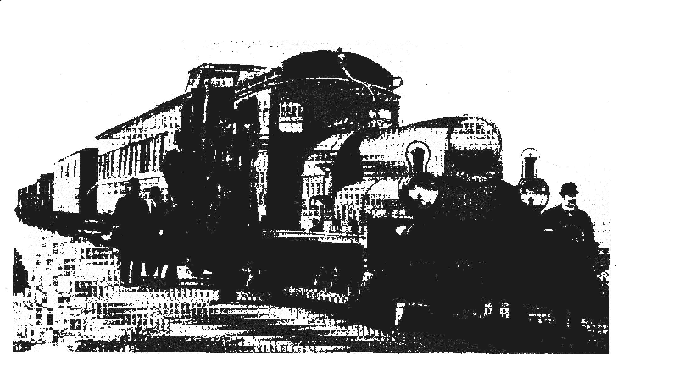 LocoSchneider1913